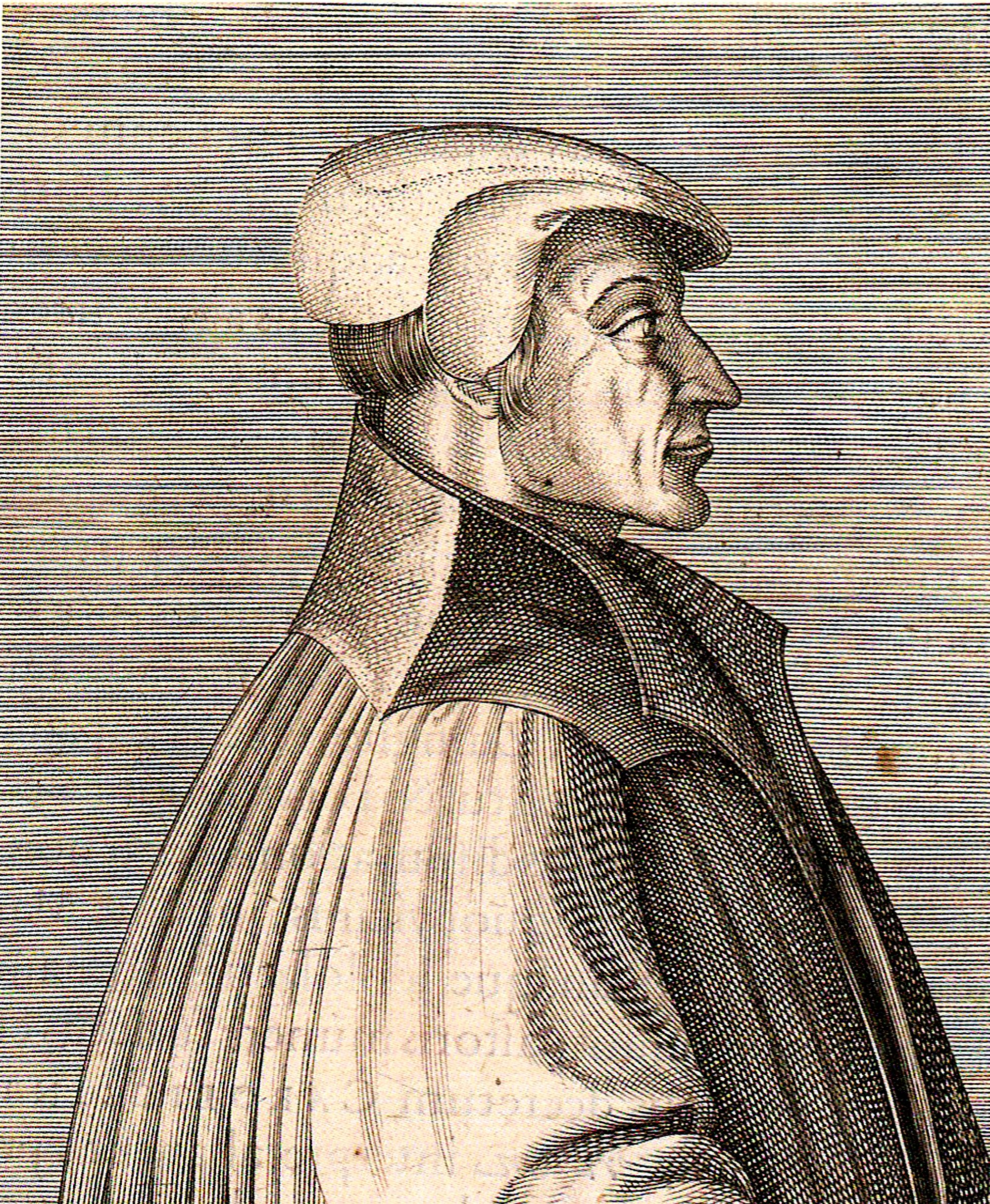 Ambrosius Blarer, Kupferstich